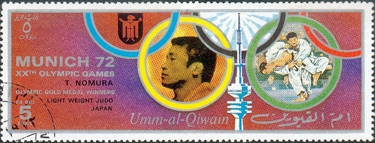 Toyokazu Nomura